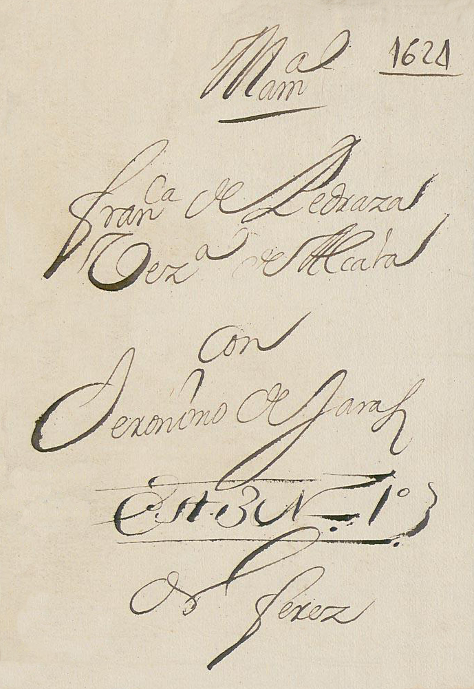 Pliego de la sentencia que la jurisprudencia de la Universidad de Alcalá dictaminó en 1624, por la denuncia de Francisca de Pedraza contra su esposo, Jerónimo de Jaras, por malos tratos contra la mujer.